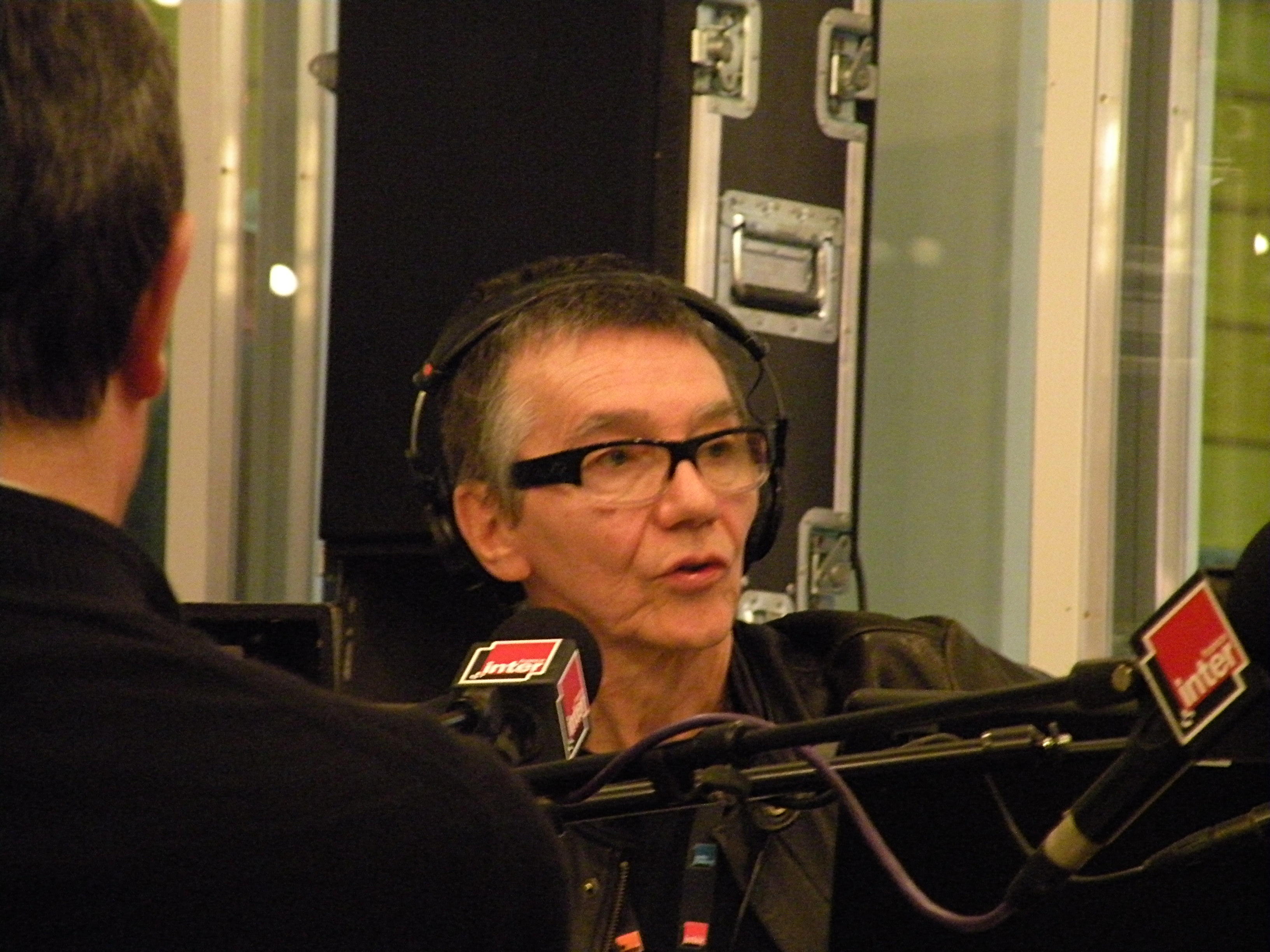 Le journaliste Stéphane Paoli lors de La Folle Journée de Nantes le 31 janvier 2009.